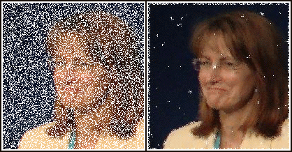 Anwendungsbeispiel des Median-Bildfilters Urheber der Bilder und Zusammenstellung: Anton (rp) 2004 Median filter for images